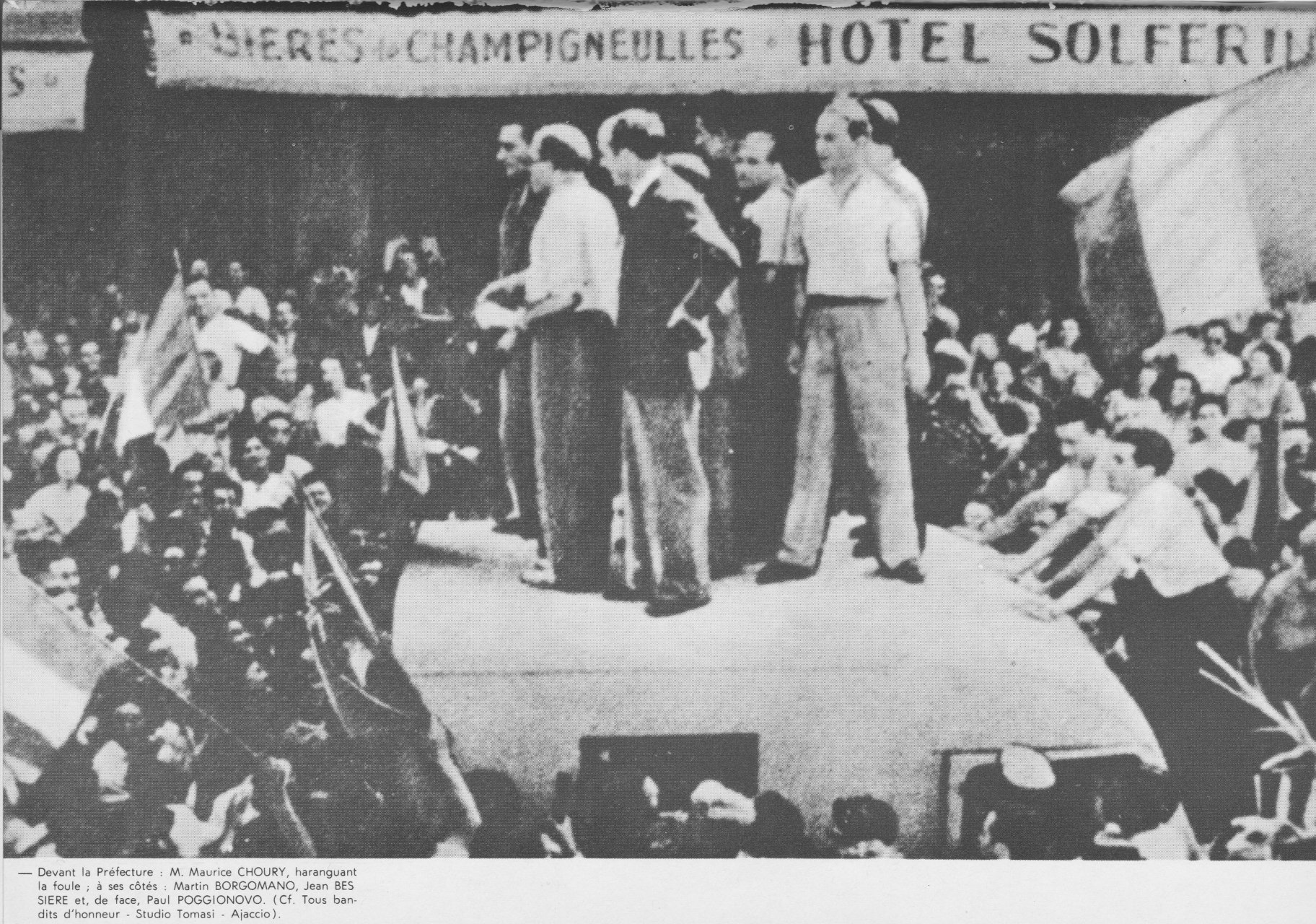 Paul Poggionovo (de face sur la photo), en 1943, prenant parti à l'insurrection à Ajaccio, place des Palmiers, en compagnie de tous les grands dirigeants du Front National pour lancer un appel à la lutte contre l’occupant